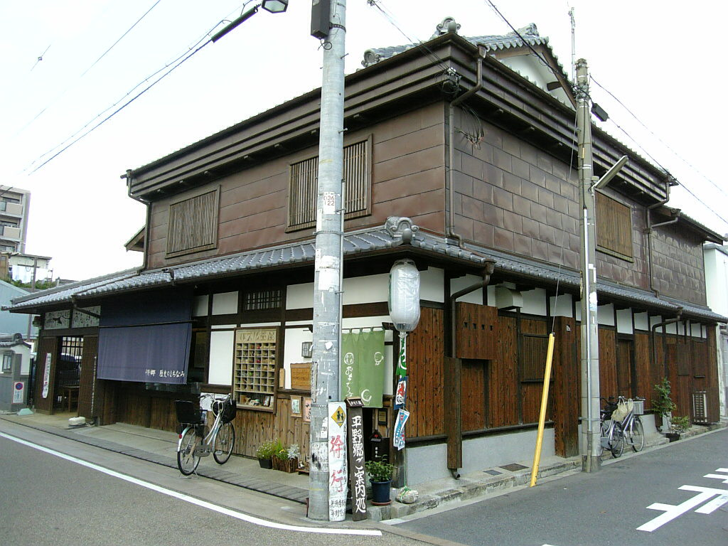 パズル茶屋 （門前茶屋おもろ庵）（平野町ぐるみ博物館）, 大阪市平野区 2007年6月撮影。 撮影者：Kansai explorer